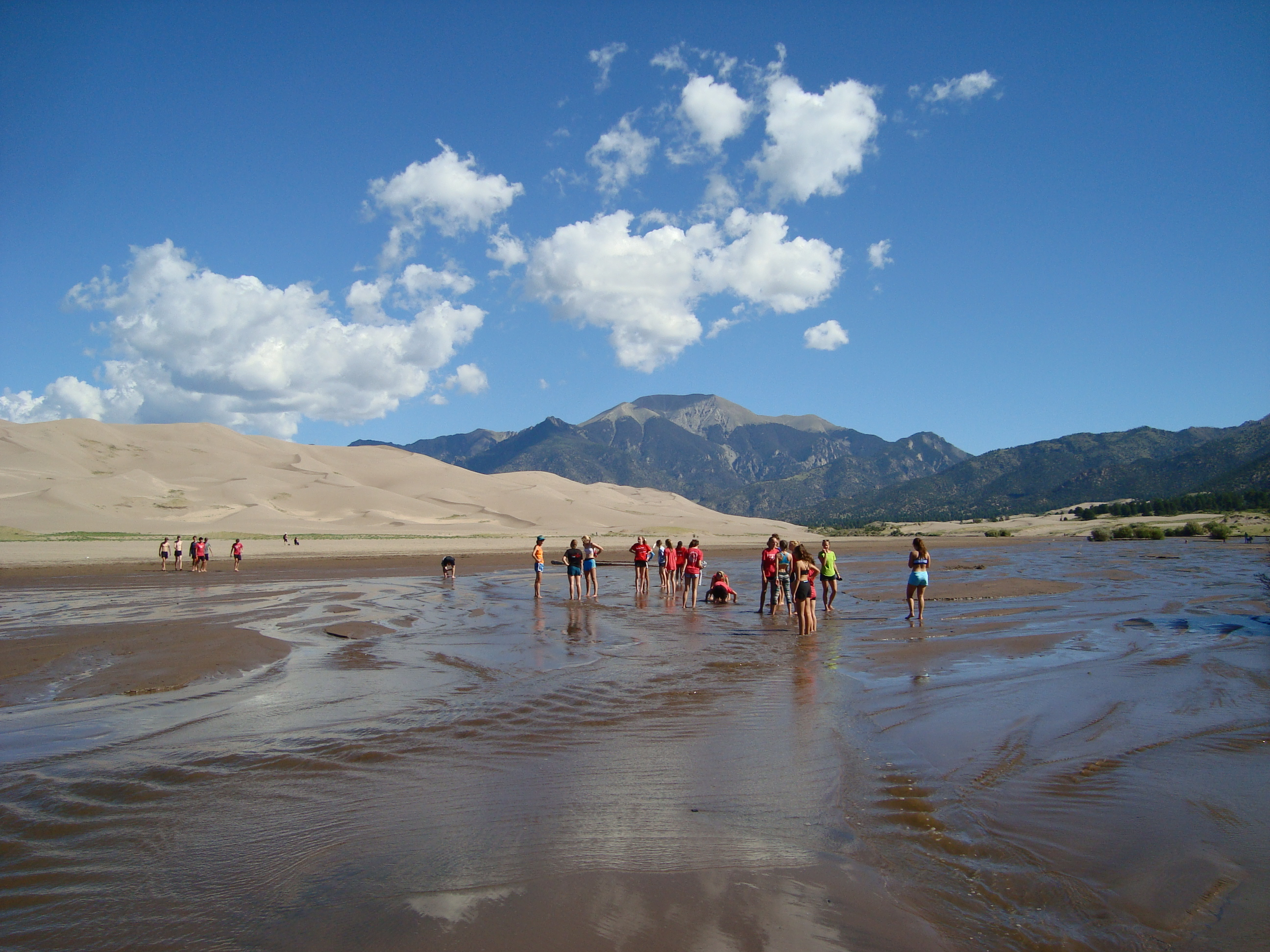 Great Sand Dunes National Park - Medano Creek, dunes and Sangre de Cristo Mountains